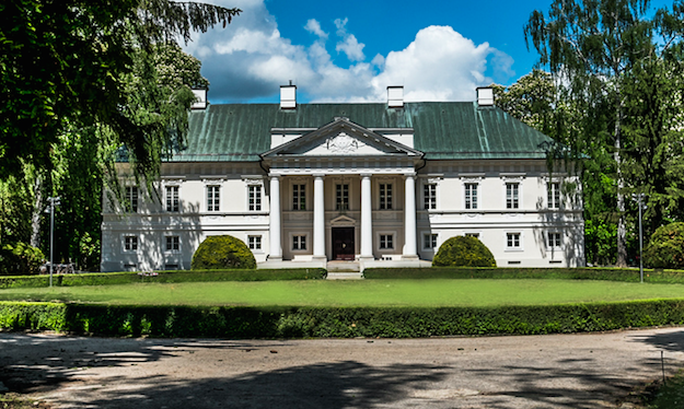 Pałac w Małej Wsi od frontu